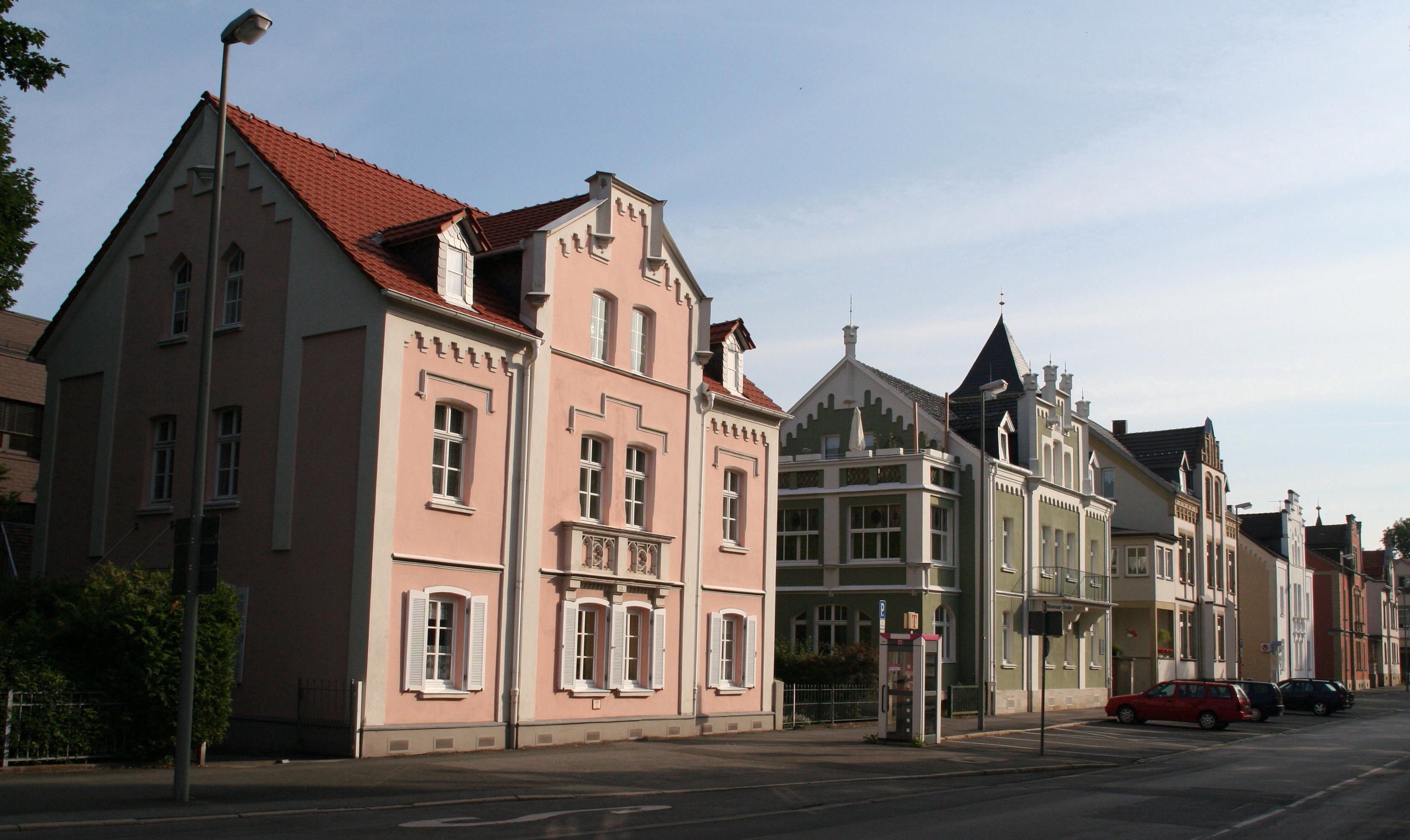 Rosenauer Straße in Coburg